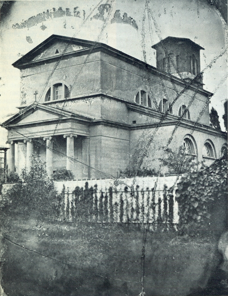 Sankt Antonius in Wuppertal-Barmen, zweite Kirche von 1826-29